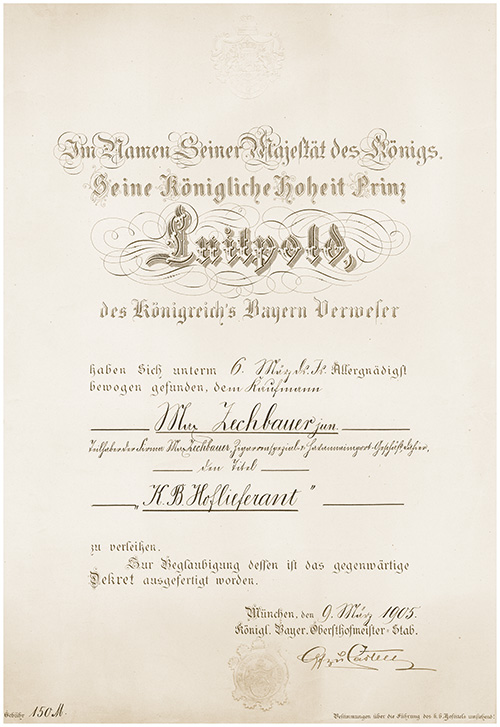 Königlich bayerische Hoflieferanten-Urkunde aus dem Jahr 1905 für Max Zechbauer, unterzeichnet von Luitpold von Bayern